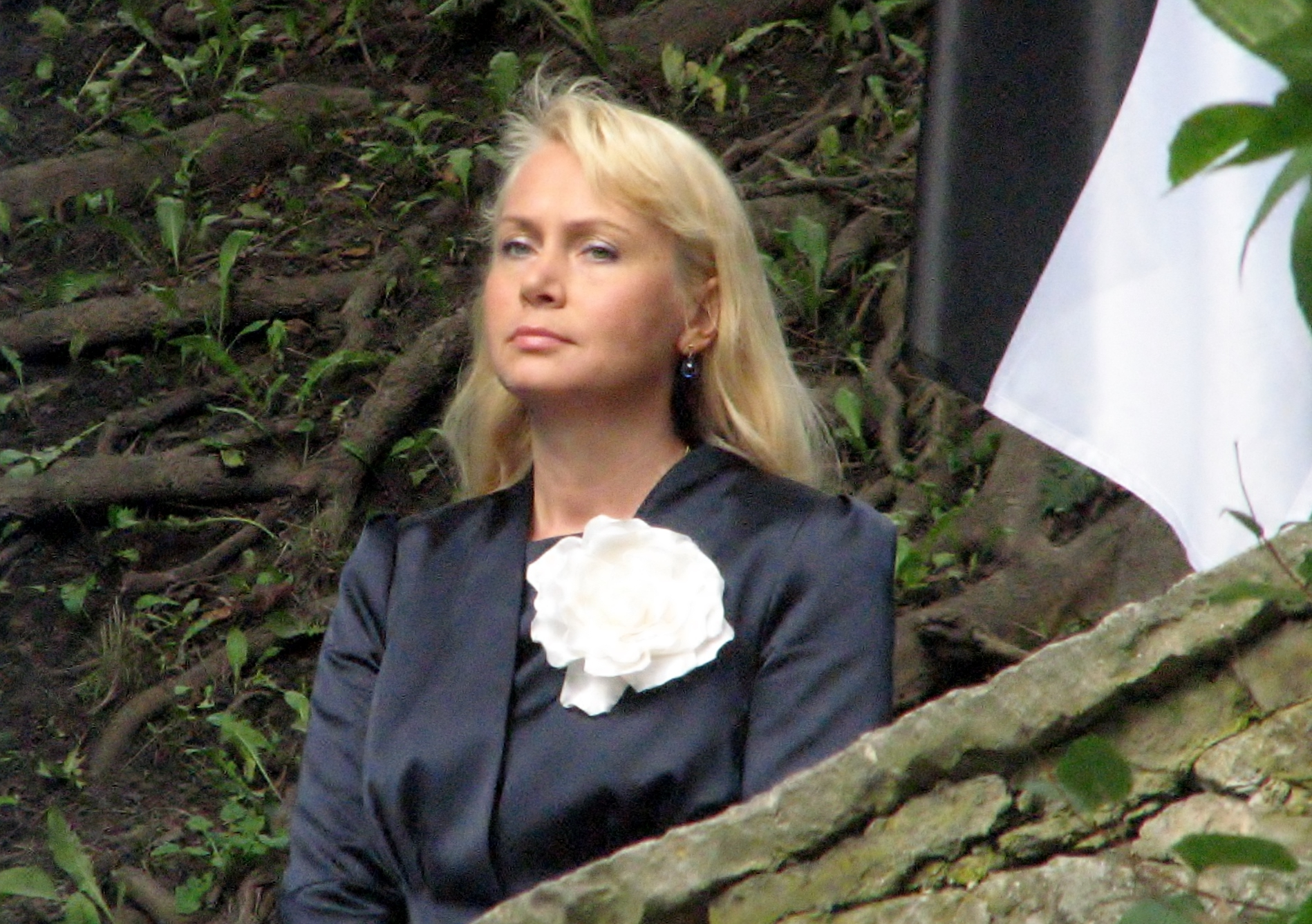 Riina Solman Hirvepargi kõnekoosolekul